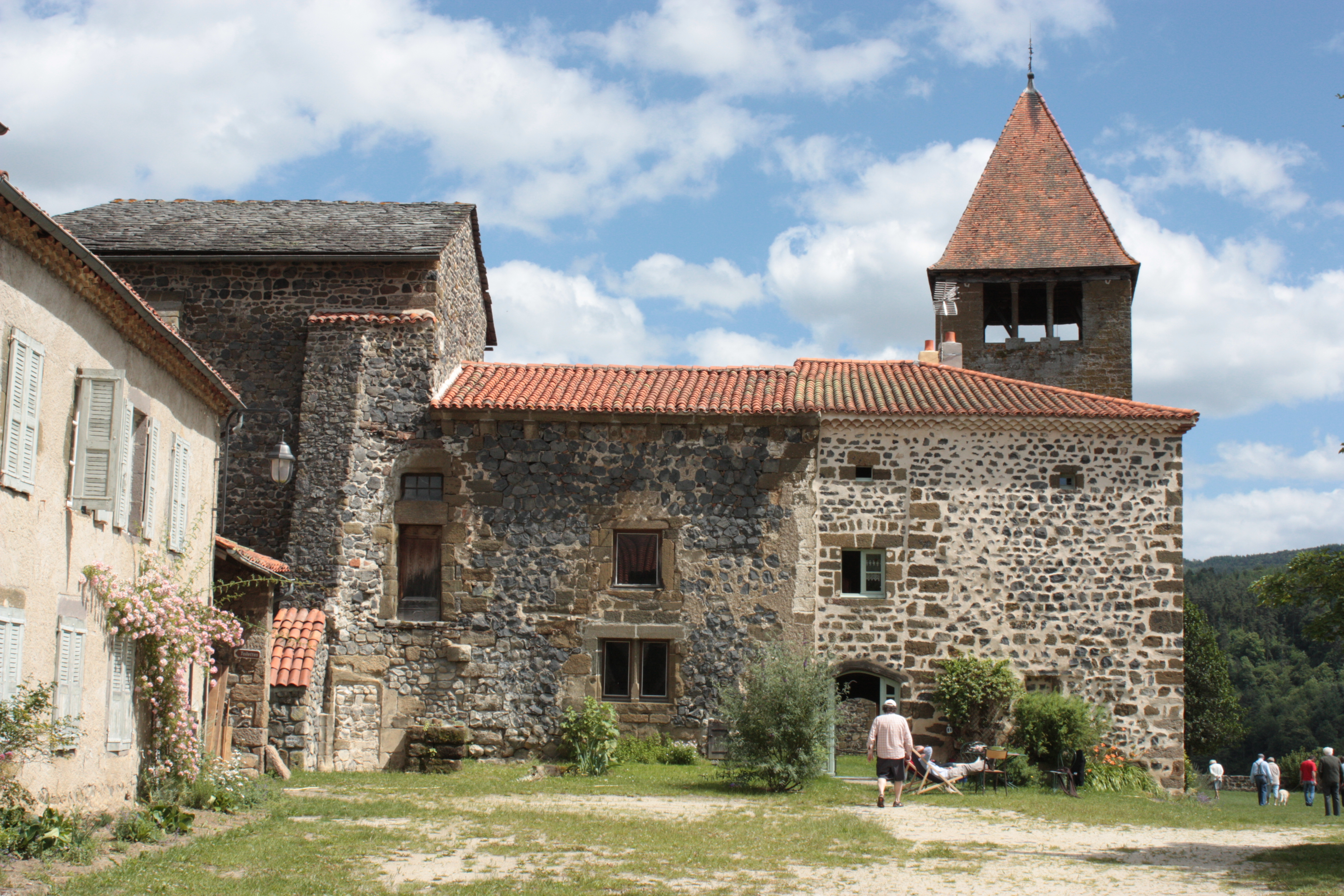 Chanteuges